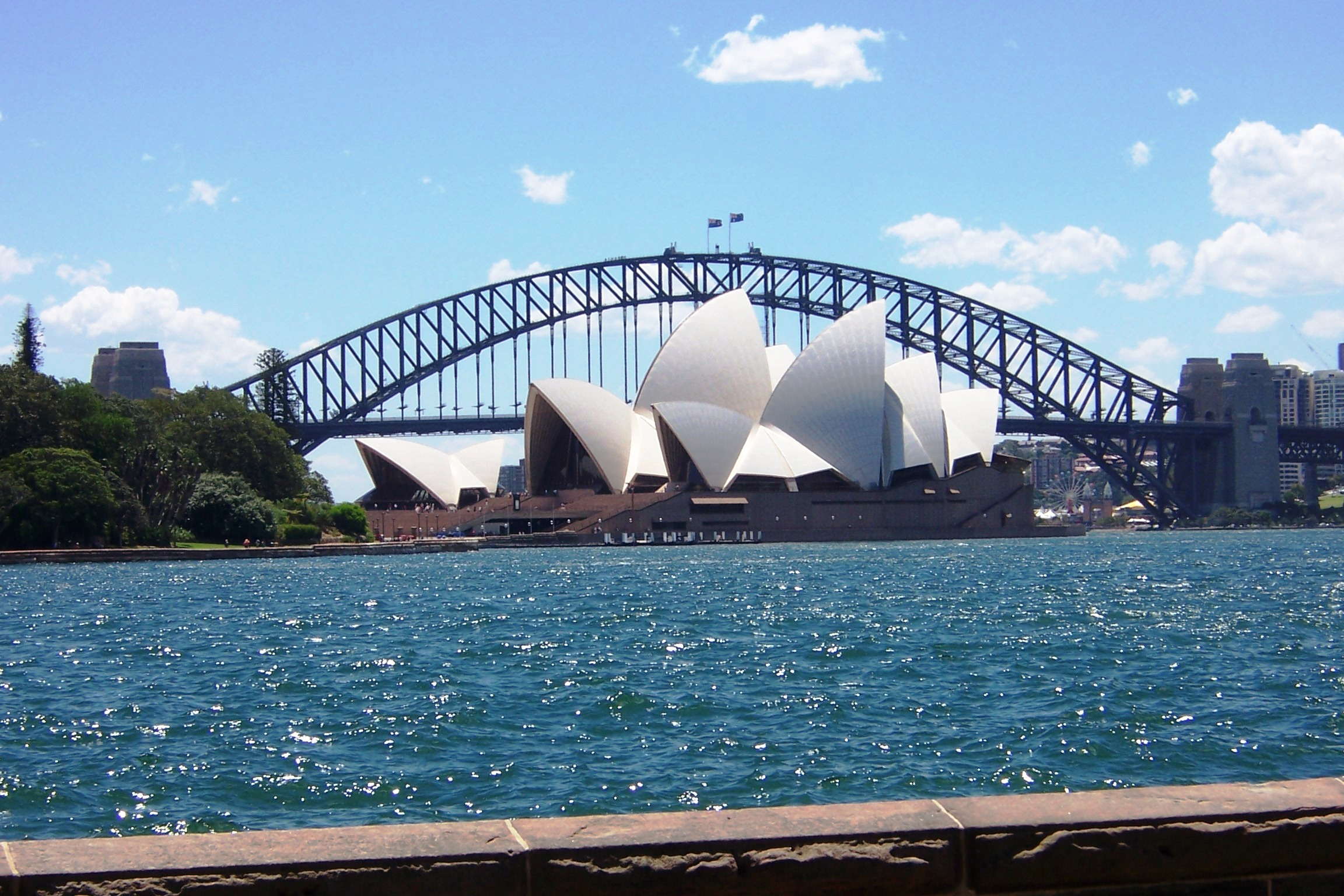 Sydney: Opera House und Harbour Bridge im Hintergrund